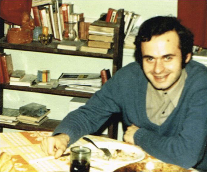 Noël Tuot en 1971, écrivain français